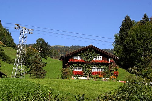 Illgau (Muotatal): Luftseilbahn Illgau - St.Karl